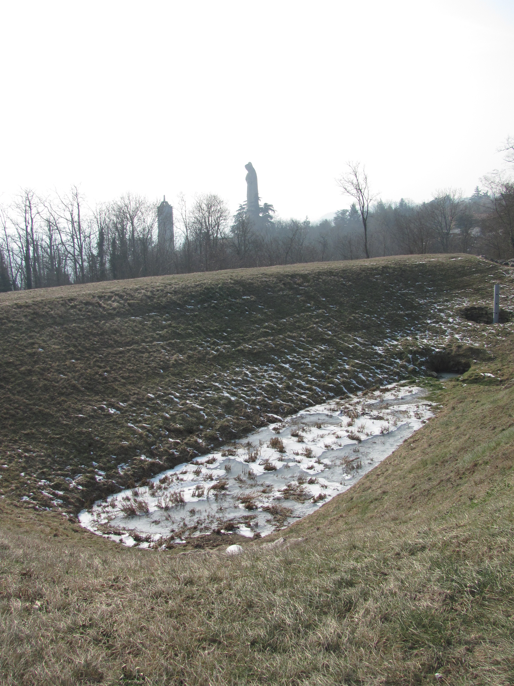 Bassin écrèteur de Couloup.